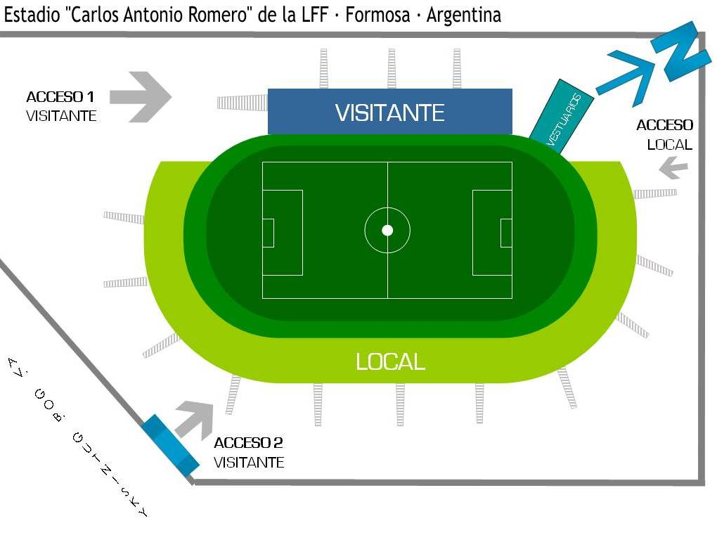 Esquema del Estadio Romero de la Ciudad de Formosa, Argentina. Capac: 23.000 pers.